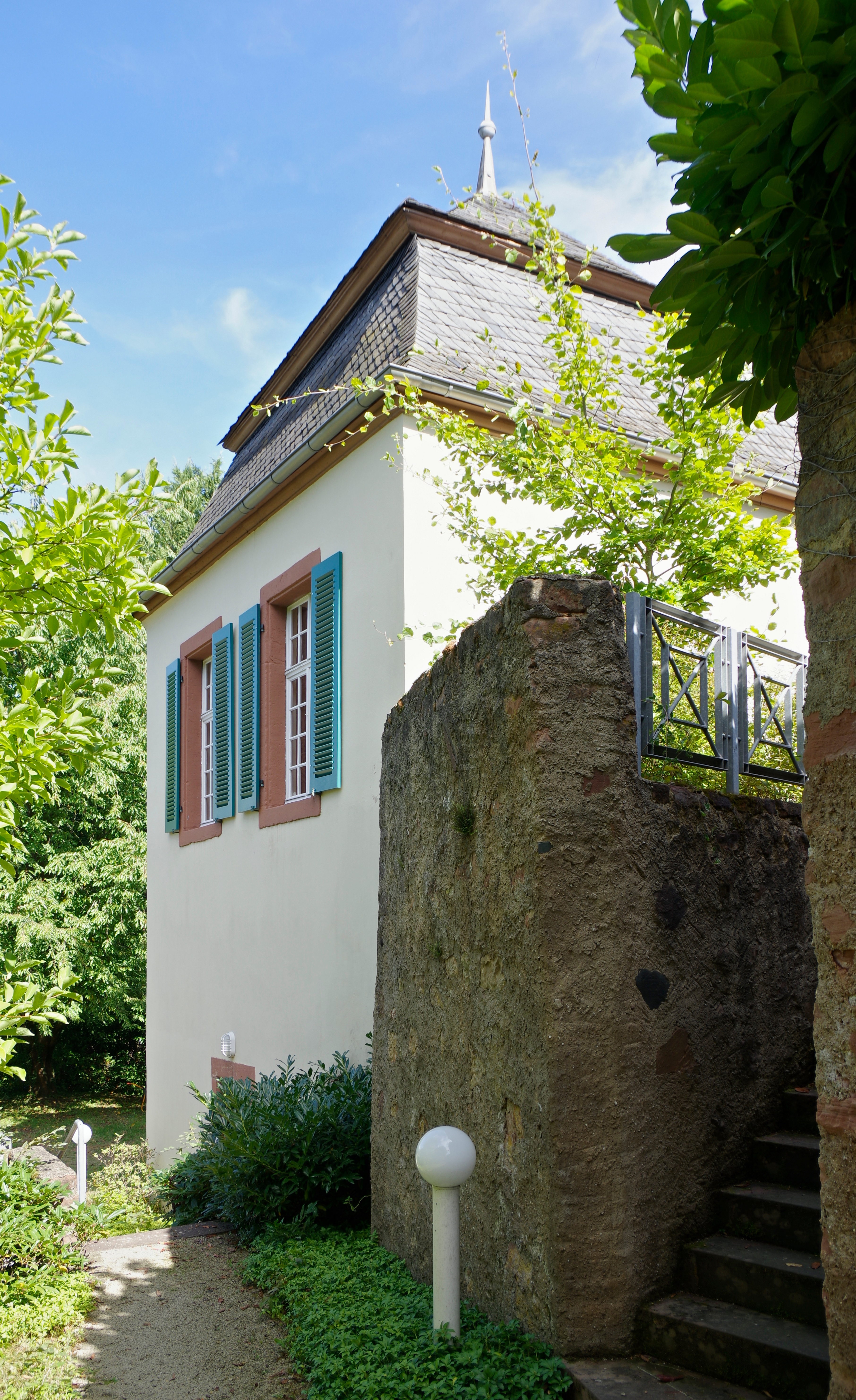 Trier, Herrenbrünnchen, Brunnenhaus, kleiner Mansardzeltdachbau, Erdgeschoss bezeichnet 1682, Obergeschoss 1728, Mundlöcher mehrere Stollen